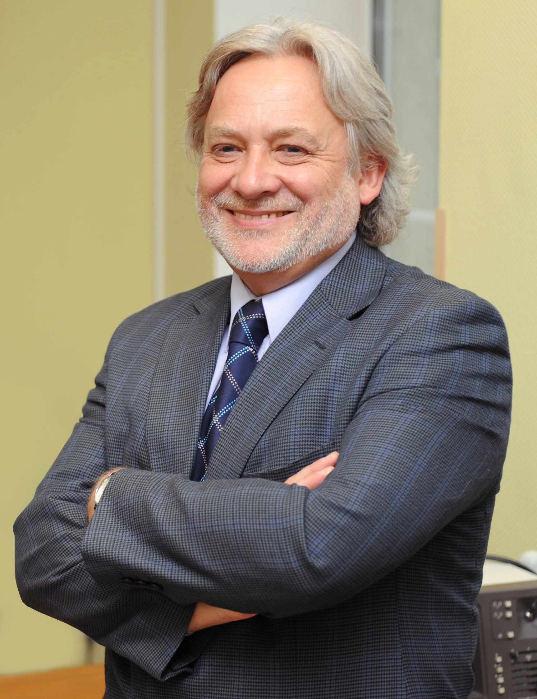 Prof. Wojciech Maksymowicz, neurochirurg.